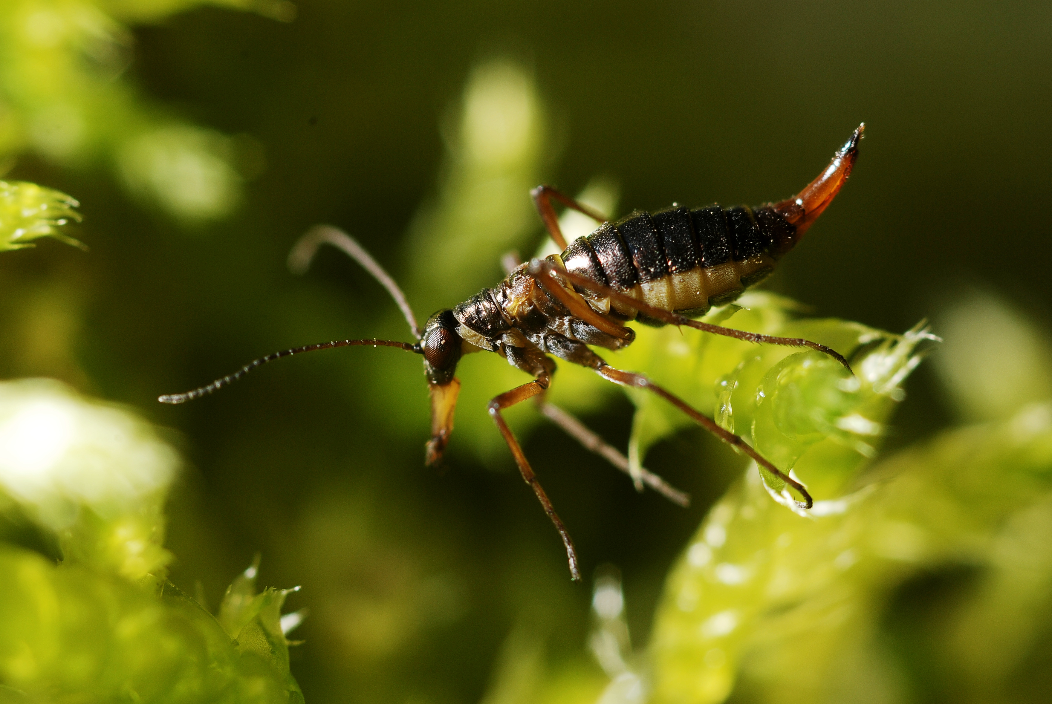 Boreus hyemalis female